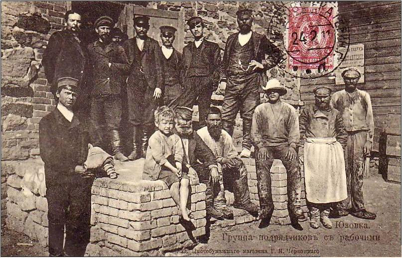 Открытка издательства писчебумажного магазина Т. Червоного в Юзовке. Группа подрядчиков с рабочими. Юзовка. Начало XX века. На открытке стардартная марка Российской империи и календарный штемпель Рутченково